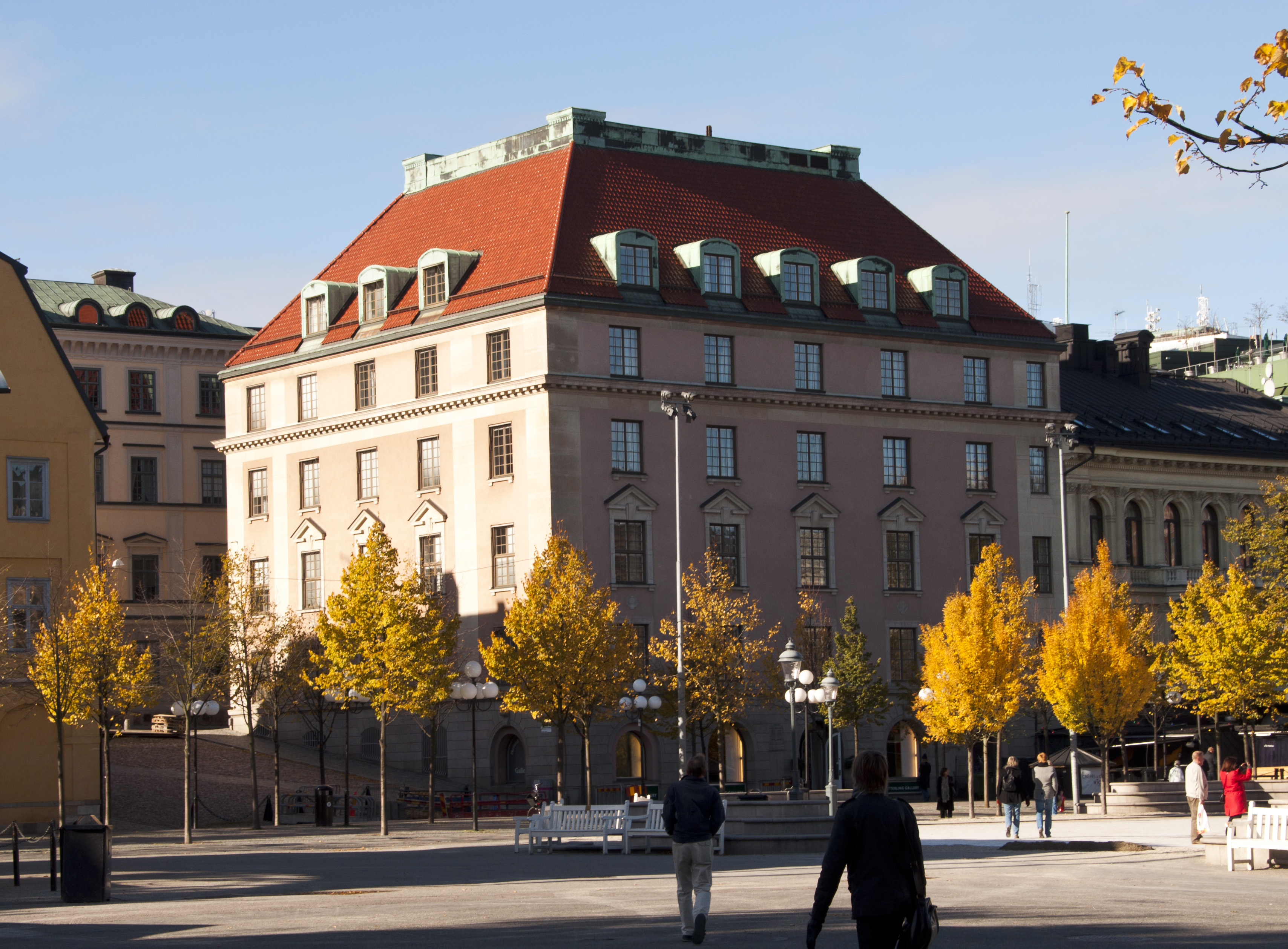 Västra Trädgårdsgatan 4 sedd från Kungsträdgården, Byggnadsår 1913-16, arkitekt Rudolf Arborelius, byggherre Civilstatens änke- och pupillkassa, byggmästare C Zetterberg.